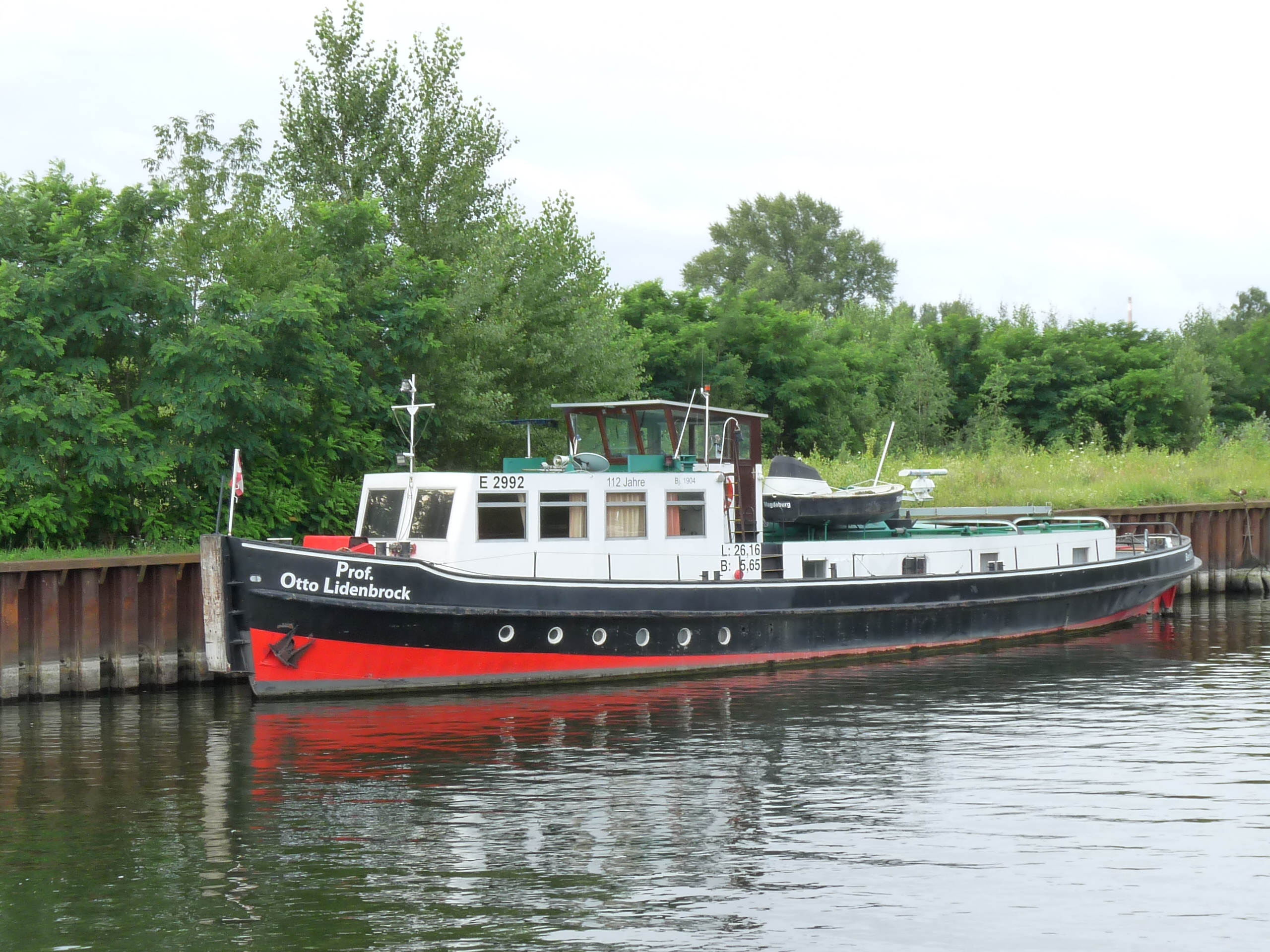 Prof. Otto Lidenbrock ex. Tümmler, ein ehemaliger deutscher Eisbrecher, der zuletzt für das Wasser- und Schifffahrtsamt Magdeburg im Einsatz war. Bis zu seiner Außerdienststellung im August 2015 war er mit 111 Jahren das älteste Schiff der Wasser- und Schifffahrtsverwaltung des Bundes. Im November 2015 wurde das Schiff in Prof. Otto Lidenbrock umbenannt. Liegeplatz in Brandenburg an der Havel, Silokanal, Kai ehemaliges Betonwerk.